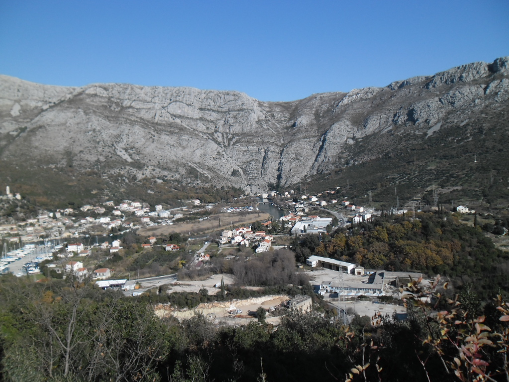 Rijeka dubrovačka